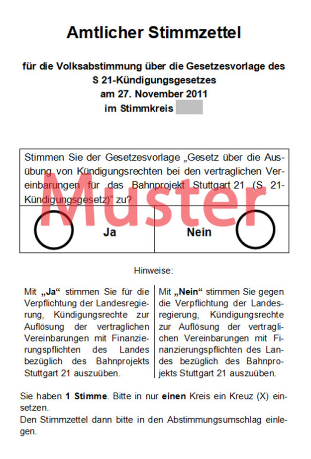 Amtlicher Stimmzettel zur Volksabstimmung über Stuttgart 21 am 27.11.2011